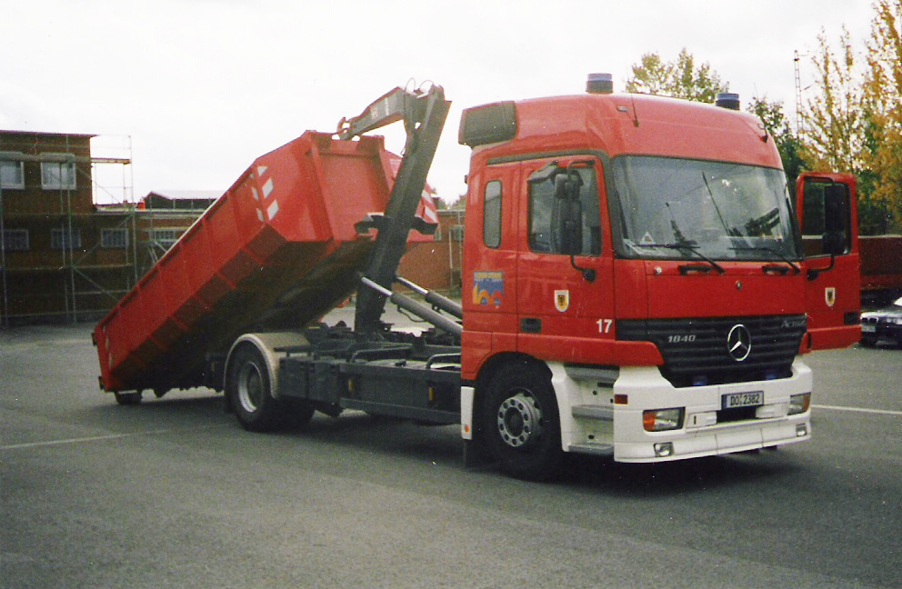 WLF17 der BF Dortmund mit AB-Mulde